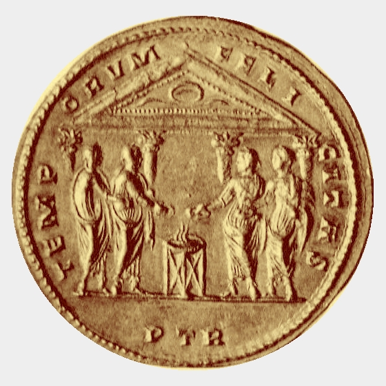 Multiple en or, 8 solidi, de Constance Chlore (revers) frappé à Trèves en 305/306 pour l'installation de la tétrarchie. Diamètre 41 mm, 42,75 g. Collection Carlos de Beistegui, catalogue n°230. Photo de Léon Marotte (1852-19..). Conservé au cabinet des médailles de la BNF. Photo colorisée - Provient très probablement du trésors d'Arras. Monnaie unique.